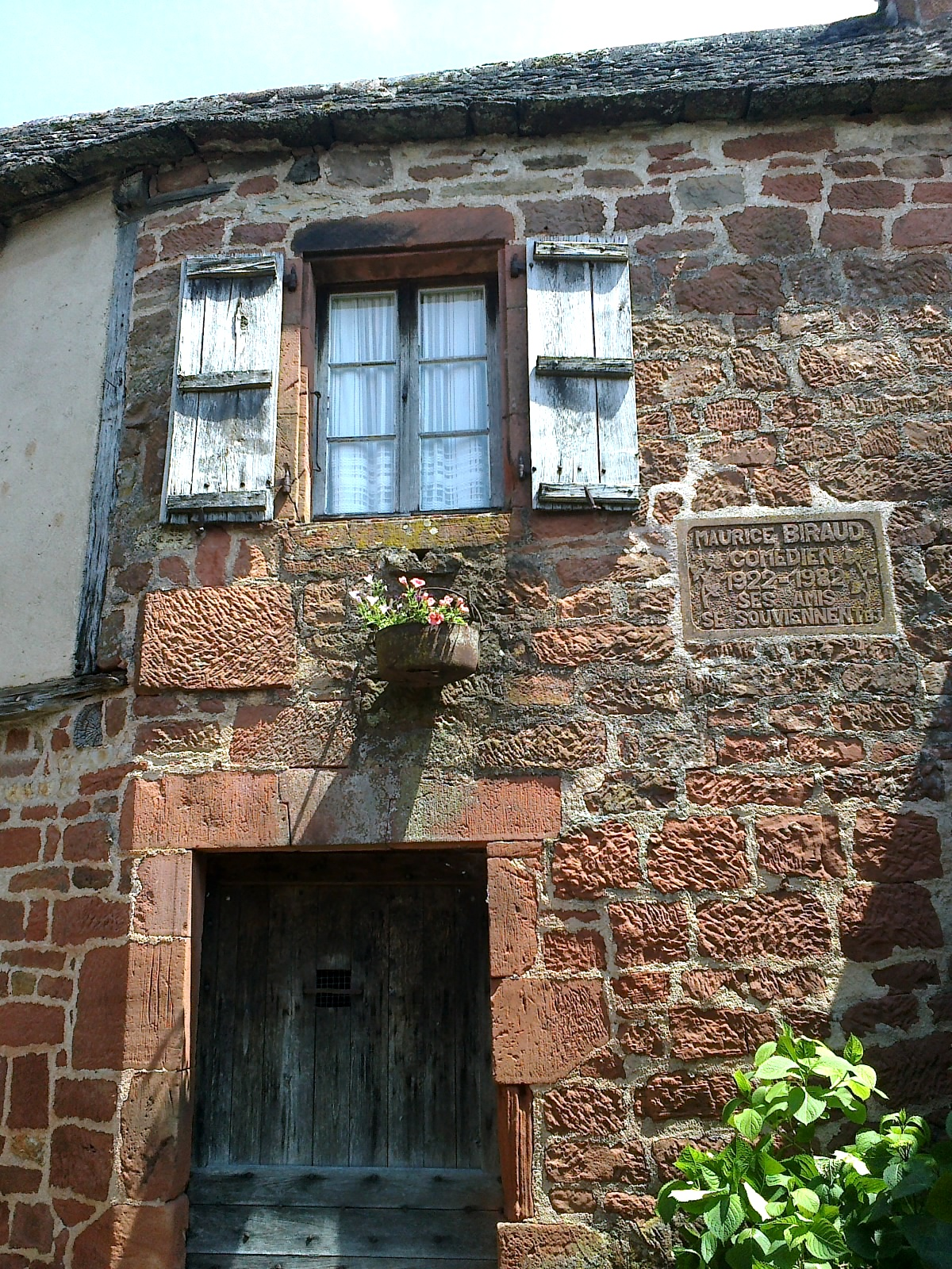 Correze Collonges-La-Rouge Rue Noire Maison De Maurice Biraud 28052012